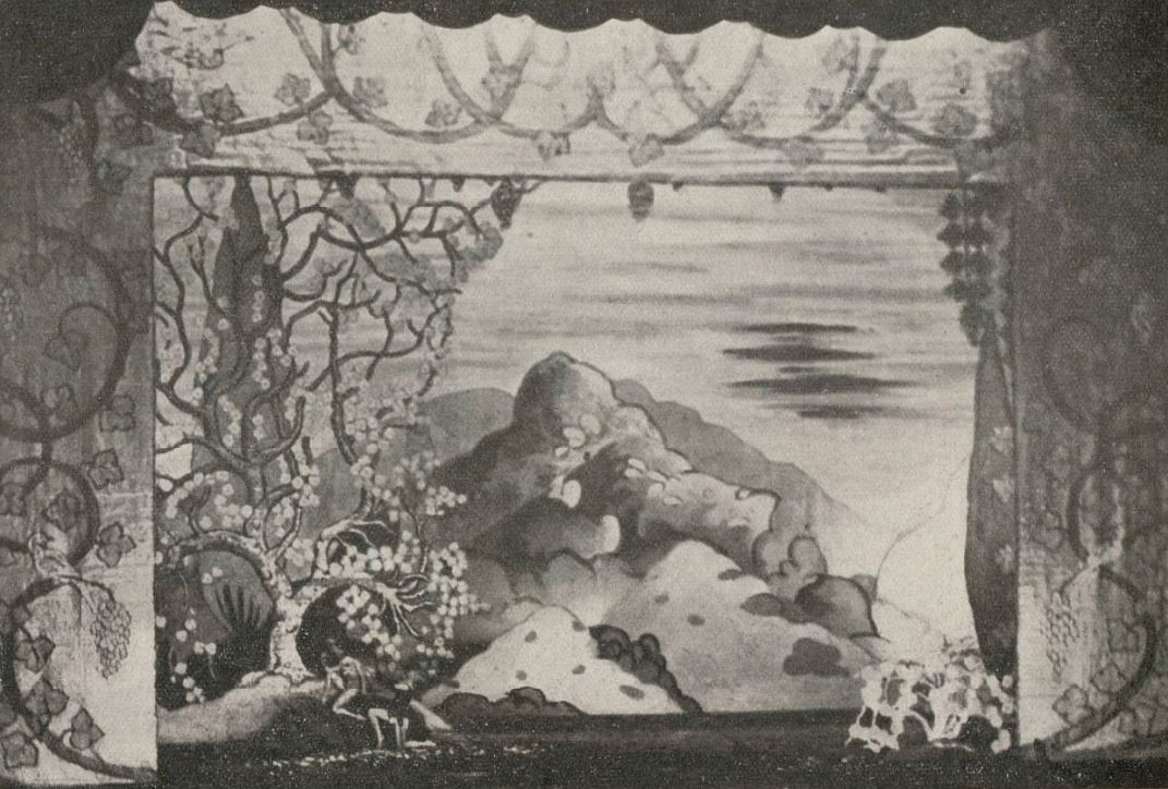 La Péri - Décor de R. Piot - 1921